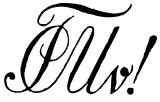 Zirkel der Landsmannschaft im CC Ulmia zu Tübingen